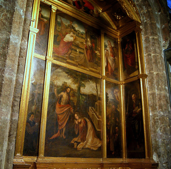 Altar de la Magdalena de la catedral de Sevilla, (España). Es un retablo totalmente pictórico y compuesto por once pinturas, que se adapta a la forma del arcosolio en el que se encuentra. Algunos autores afirman que fue ejecutado por un artista perteneciente a la escuela de Alejo Fernández. En el cuerpo principal están representados La Aparición de Jesús resucitado a María Magdalena y, sobre ella, la Anunciación. En los laterales vemos a Santa Catalina con Santa Bárbara y San Andrés, Santiago apóstol, San Pedro y San Pablo. En el banco aparecen el donante, Pedro García de Villadiego con San Benito Abad y Catalina Rodríguez con San Francisco de Asís.